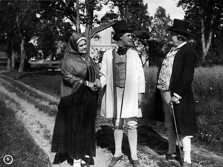 Värmlänningarna. Film. Actors: Gustaf Ranft, Anna Diedrich and Tor Weijden